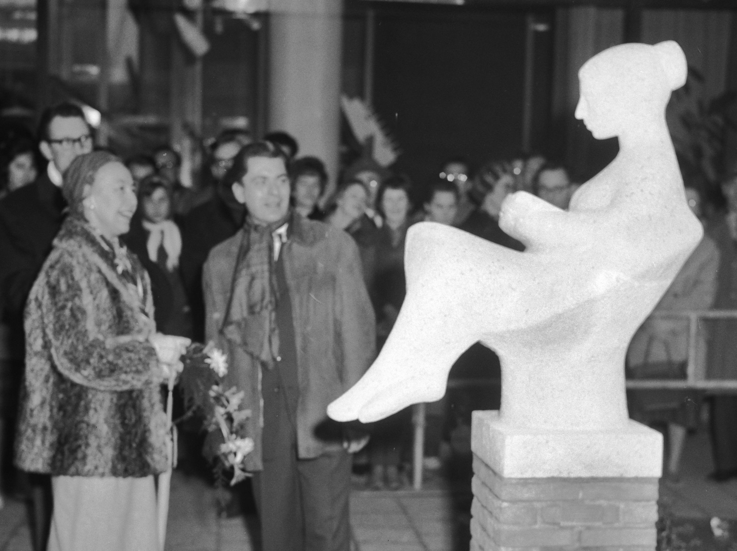 Collectie / Archief : Fotocollectie Anefo Reportage / Serie : [ onbekend ] Beschrijving : Onthulling van beeldje 'Lezend meisje' in de Karel Doormanstraat t.g.v. de boekenweek door mevrouw mr. J.M. van Walsum-Quispel. Rechts van haar beeldhouwer Huib Noorlander. Datum : 29 maart 1960 Trefwoorden : BOEKENWEEK, beeldjes, onthullingen Fotograaf : Behrens, Herbert / Anefo Auteursrechthebbende : Nationaal Archief Materiaalsoort : Negatief (zwart/wit) Nummer archiefinventaris : bekijk toegang 2.24.01.04 Bestanddeelnummer : 911-1340